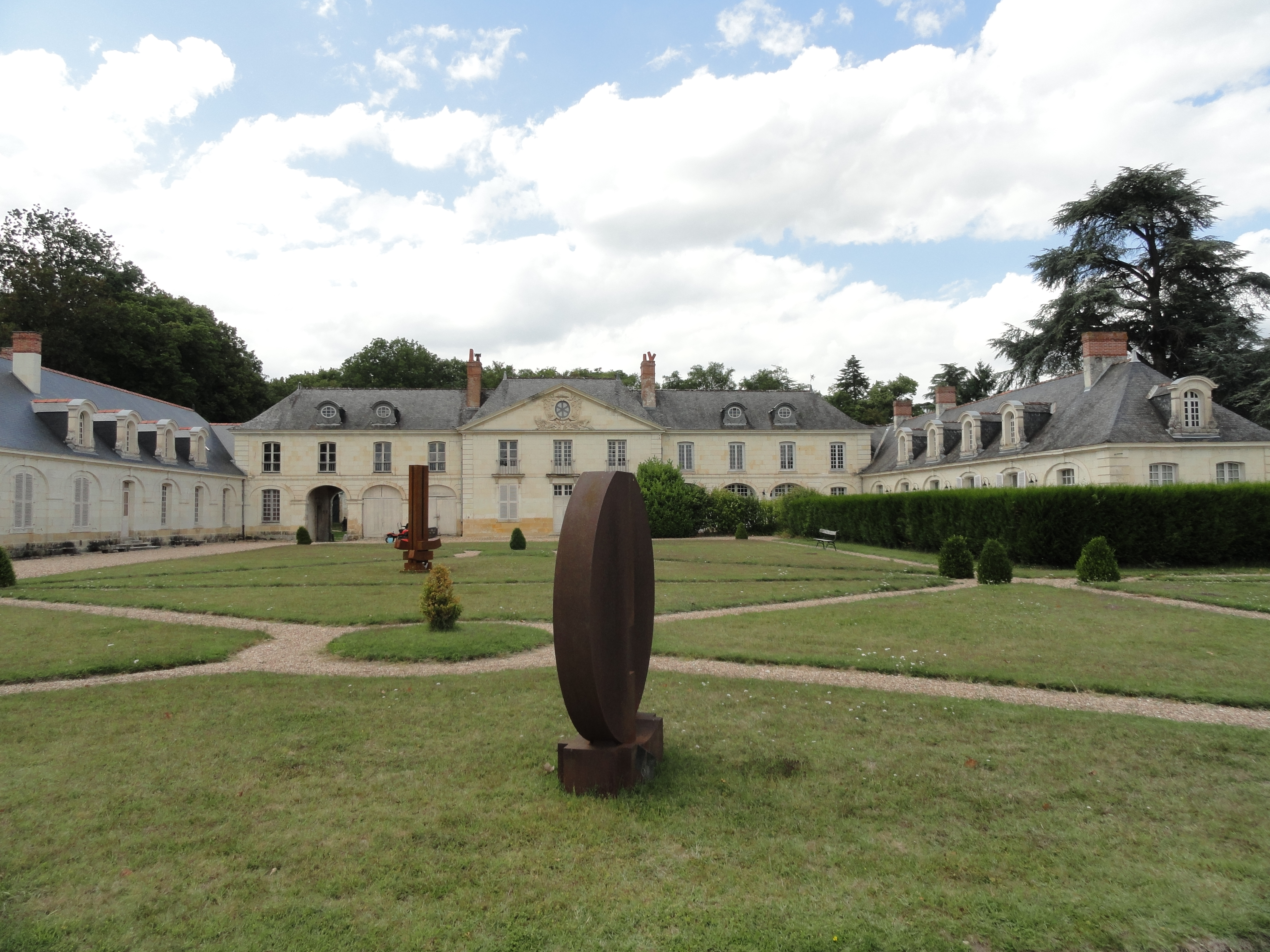 chateau des ormes